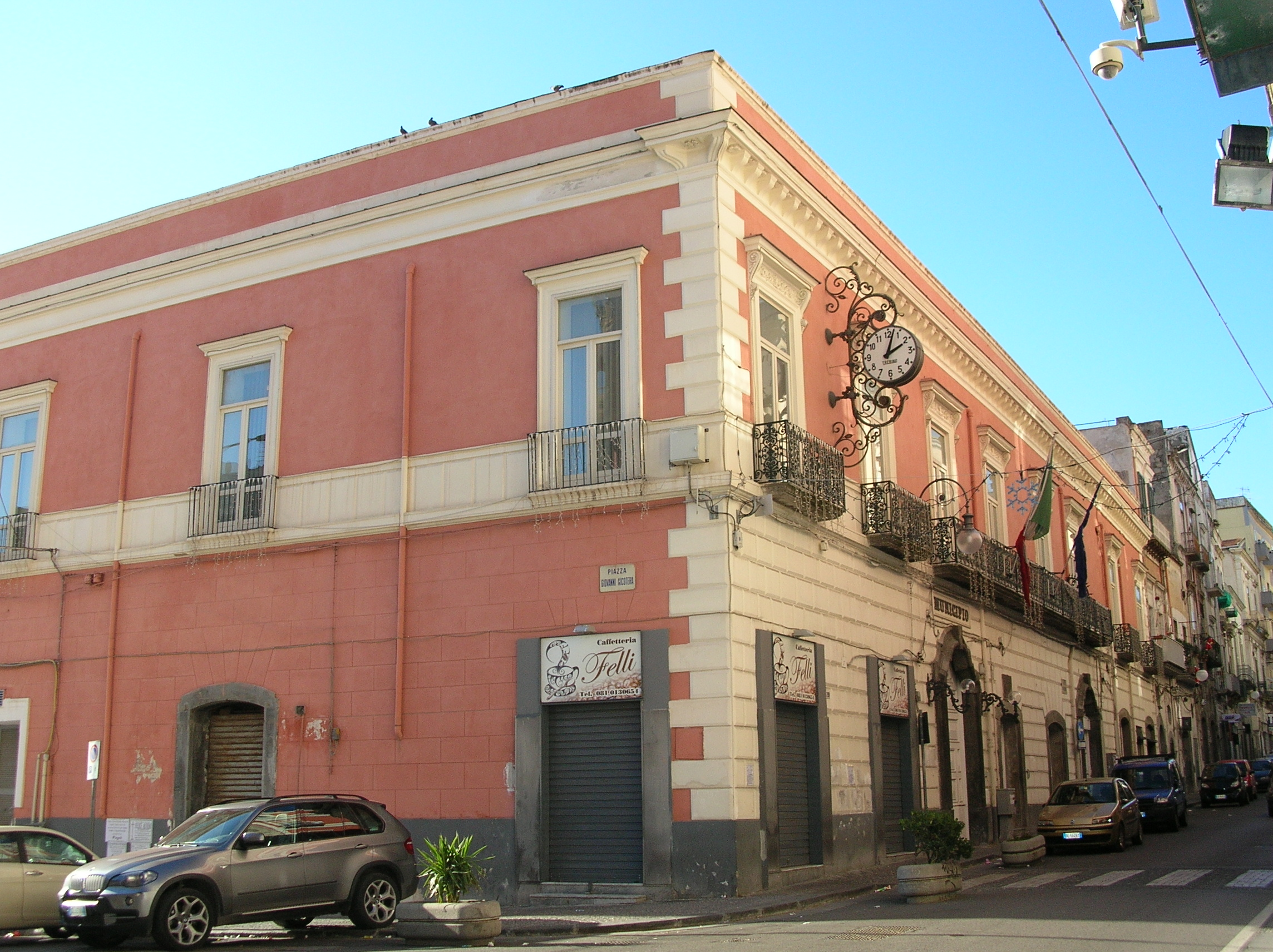 Torre Annunziata Palazzo Criscuolo casa comunale